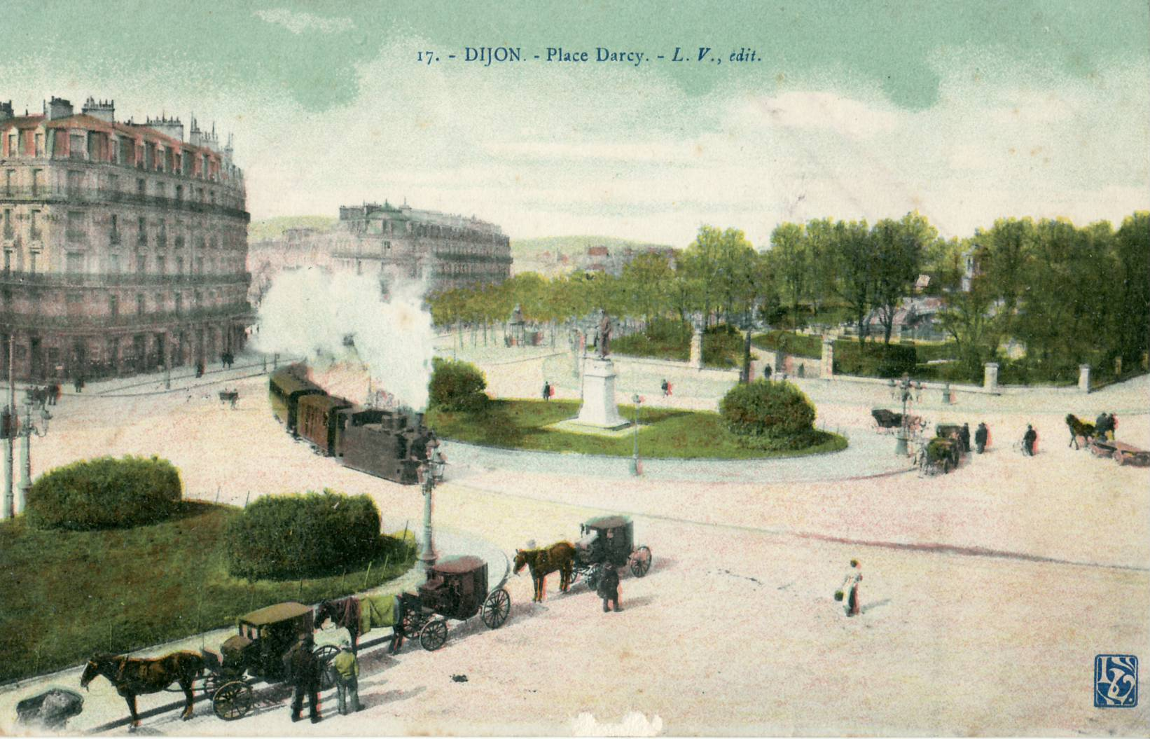 Carte postale ancienne éditée par L. V. édit, n°17 DIJON - Place Darcy Un "Tacot" des Chemins de fer départementaux de la Côte-d'Or traverse la place.